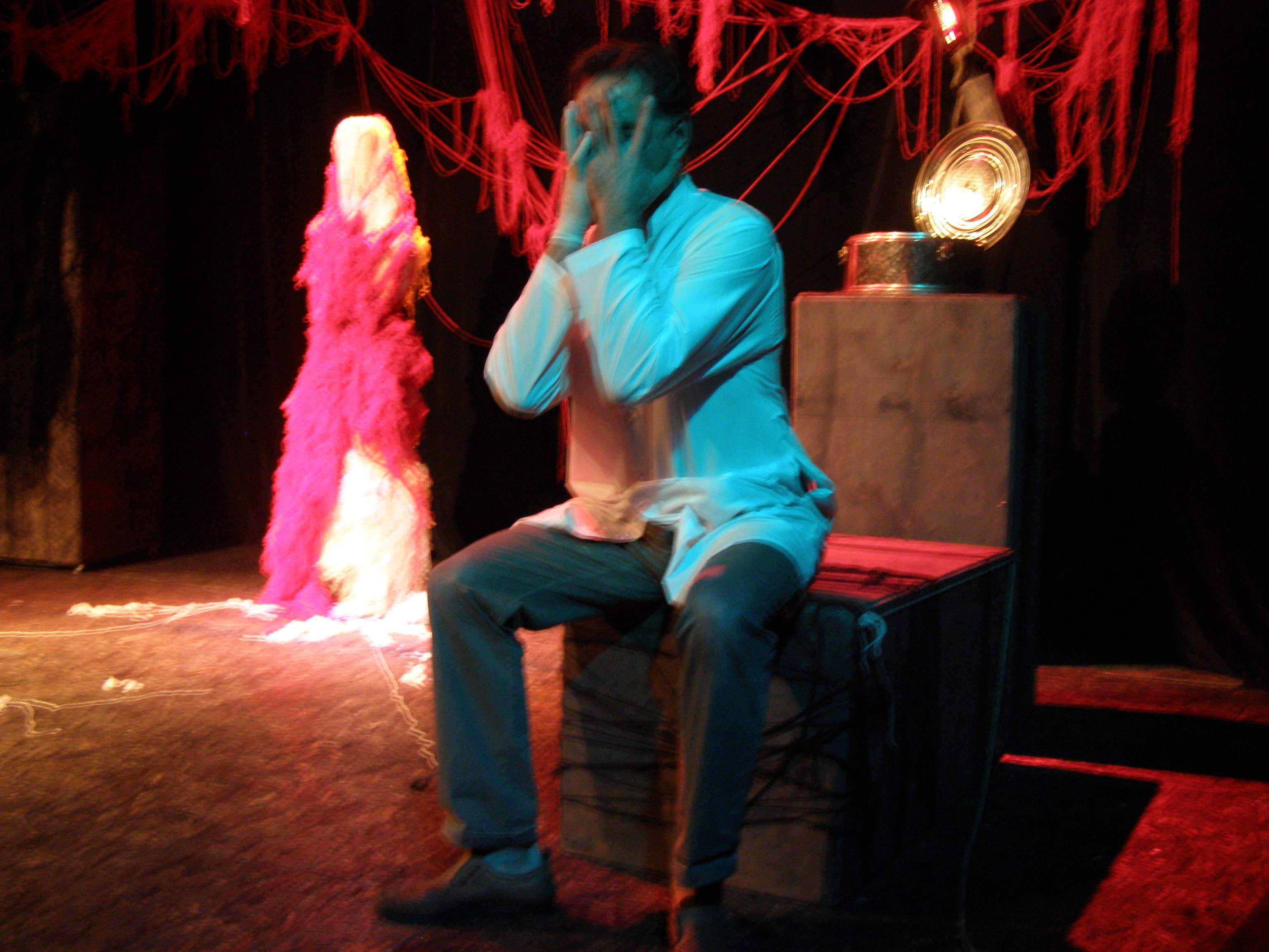 Народний артист України Мельник Михайло Васильович, Академічний український театр одного актора «Крик», вистава «Дикий»